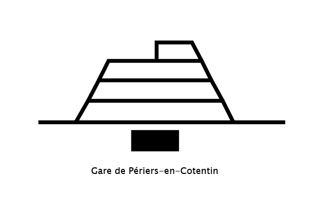 Plan des voies de la gare de Périers-en-Cotentin suivant PL n° 56 du carnet SNCF 1957.